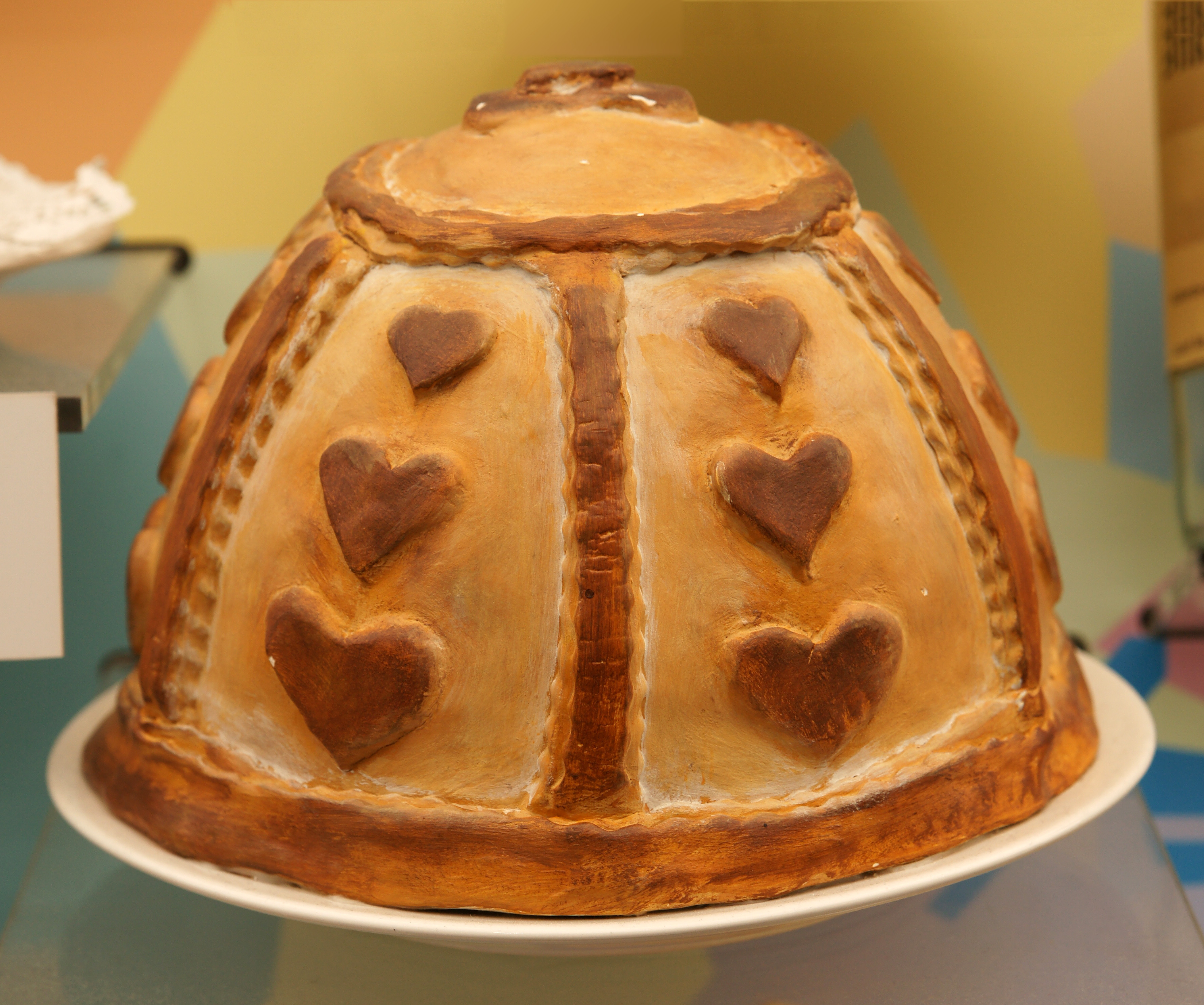 Luzerner Chügelipastete (Lozärner Chögelipastete), Nachbildung, Bern BEA expo 2011